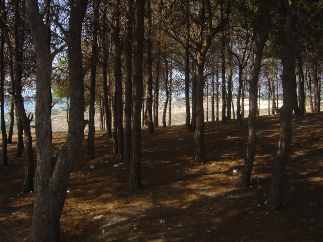 غابة في الأنصارية-لبنان.